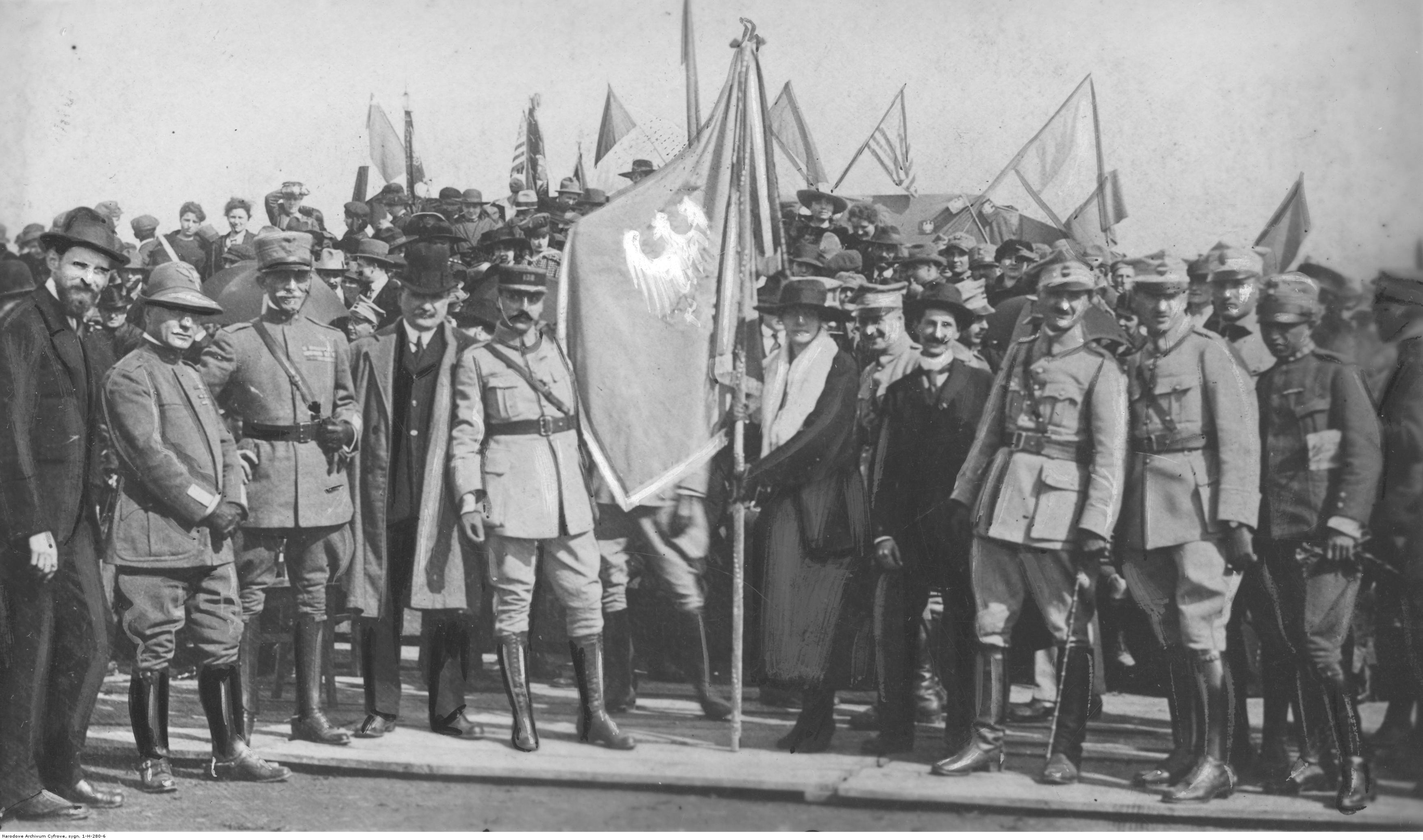 Polski obóz wojskowy w La Mandria di Chivasso. Burmistrz miasta Chivasso ofiarowuje sztandar dla pułku im. Zawiszy Czarnego; 1919 r.. Koncern Ilustrowany Kurier Codzienny - Archiwum Ilustracji. Sygnatura: 1-H-280-6